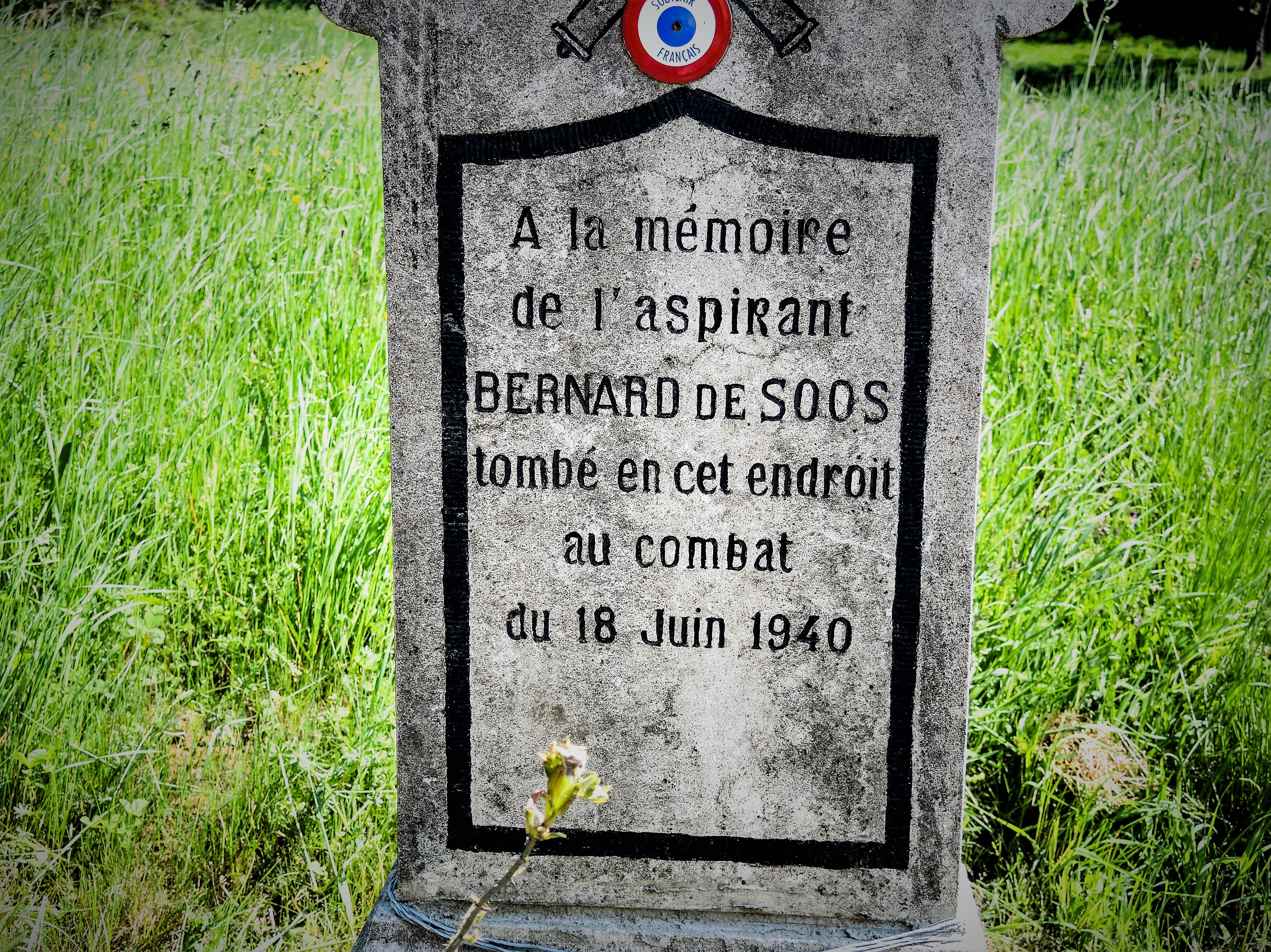 Stèle de l'aspirant Bernard de Soos. Entrée sud du village d'Aïssey. Doubs